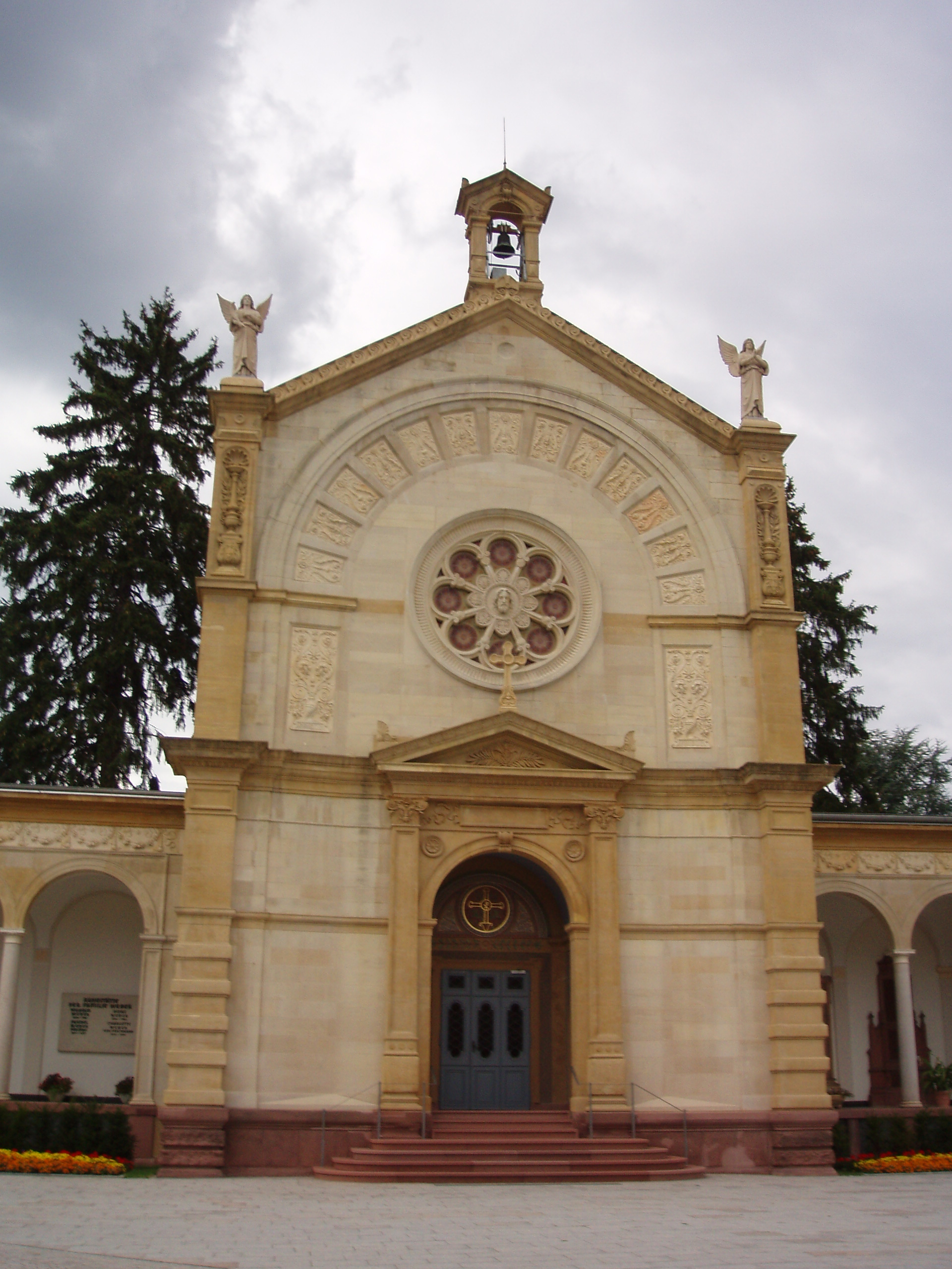 Kapelle im Hauptfriedhof Karlsruhe 1874-76 nach Plänen von Josef Durm